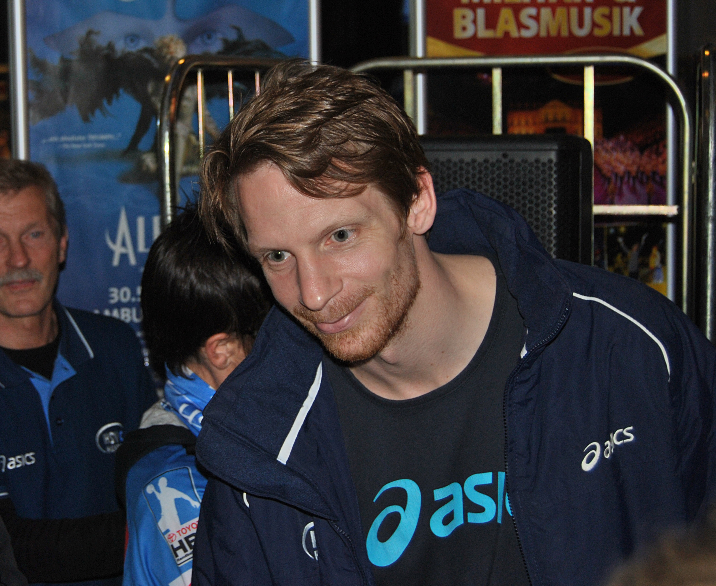 Dan Beutler 2012 bei einer Autogrammstunde